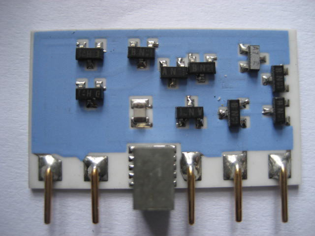 Amplificatore operazionale ibrido ad altissime prestazioni audio con transistor discreti e resistenze di precisione su substrato